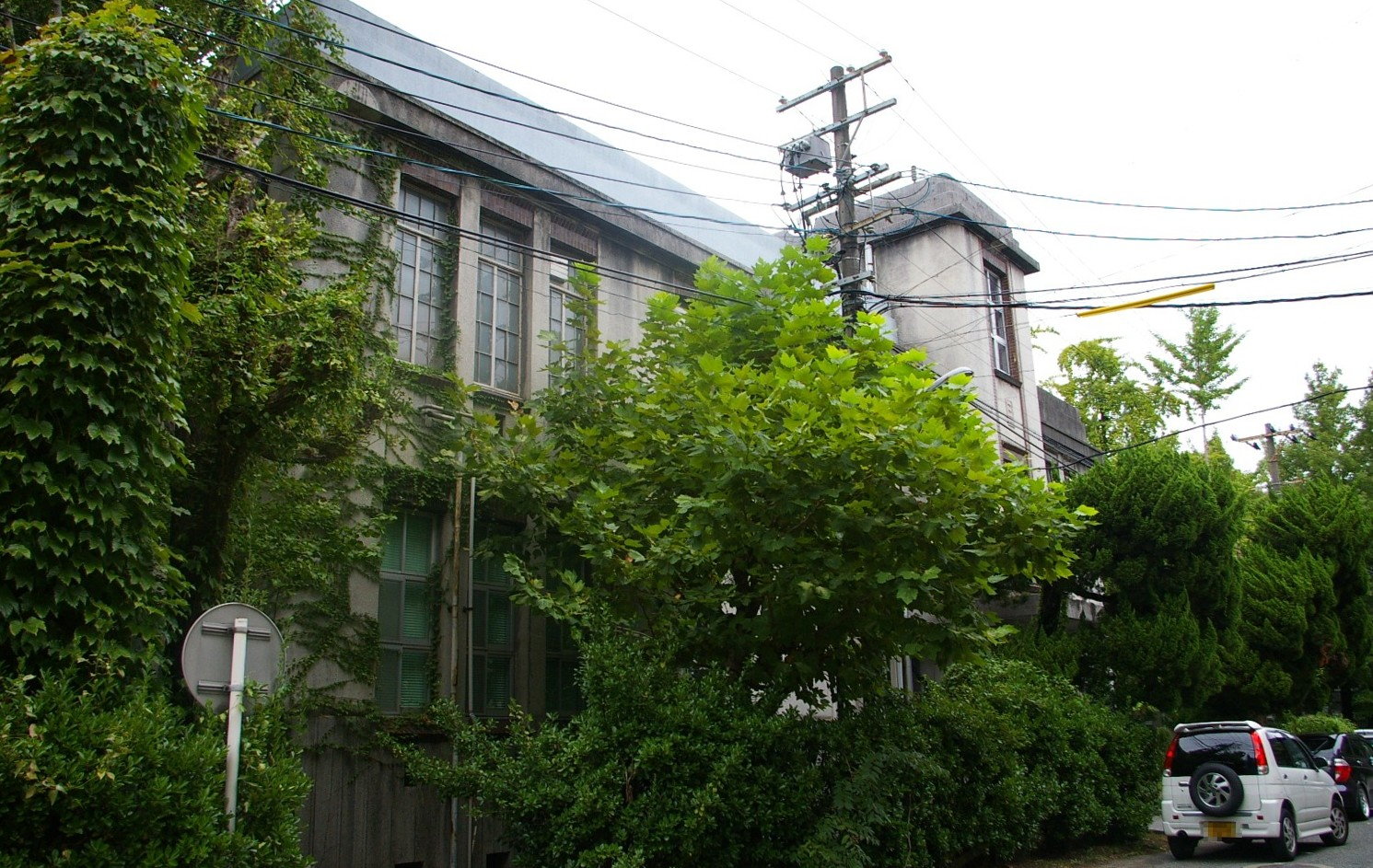 福岡市内で撮影